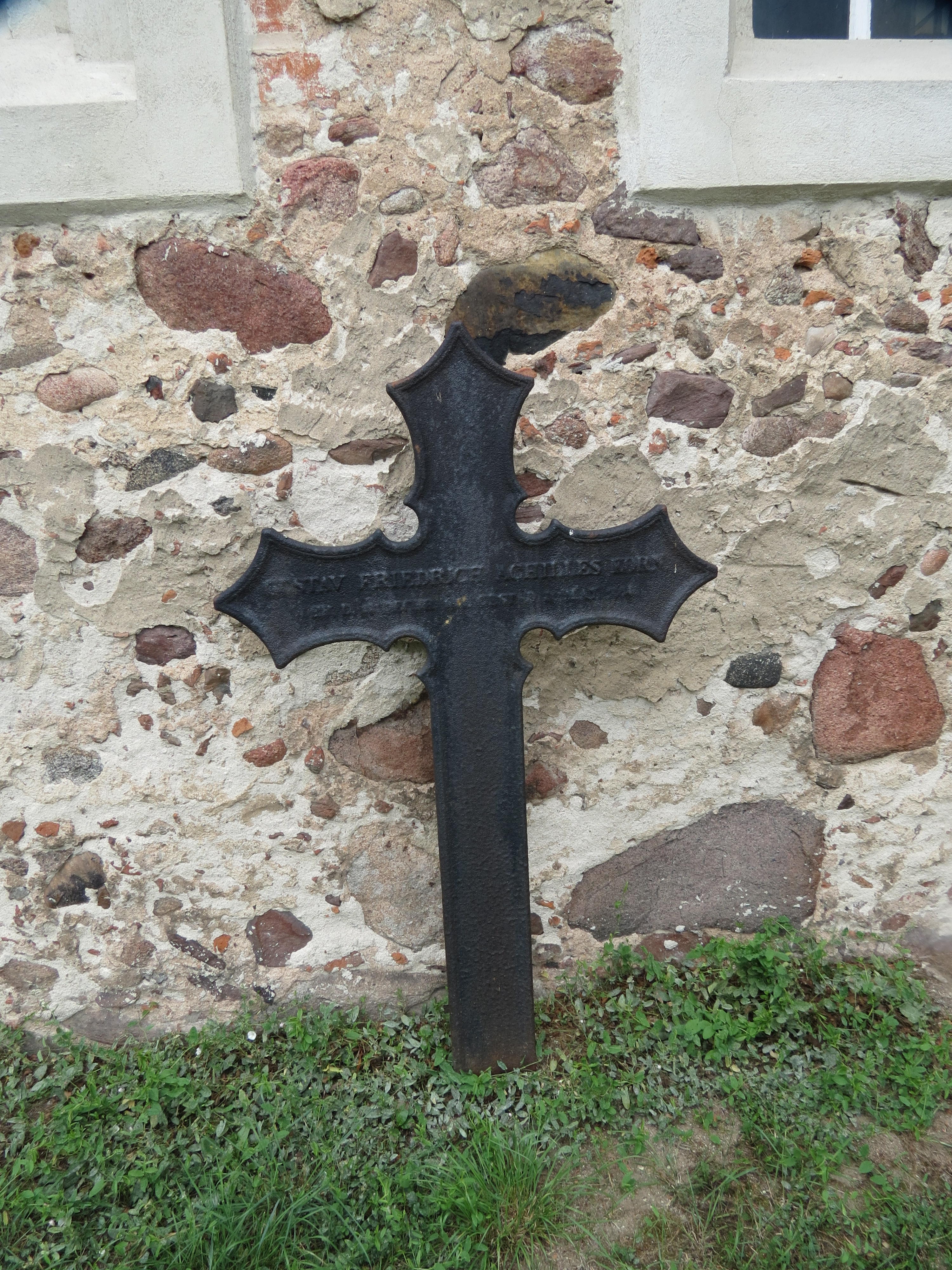 Grabkreuz des Achilles Gustav Friedrich Korn an der Ostseite der Dorfkirche Laubst, Ortsteil der Stadt Drebkau, Landkreis Spree-Neiße, Brandenburg